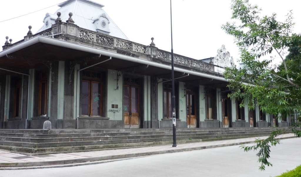 Estación de ferrocarril al Atlántico, en San José Costa Rica, diseño de Jaime Carranza